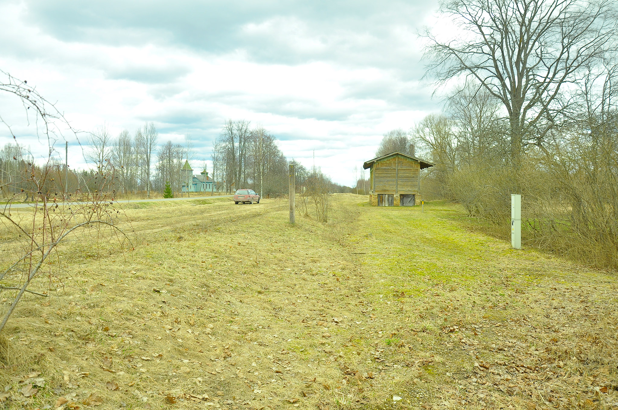 Dzelzceļa stacija "Vīksna" slēgtajā līnijā Ieriķi - Abrene